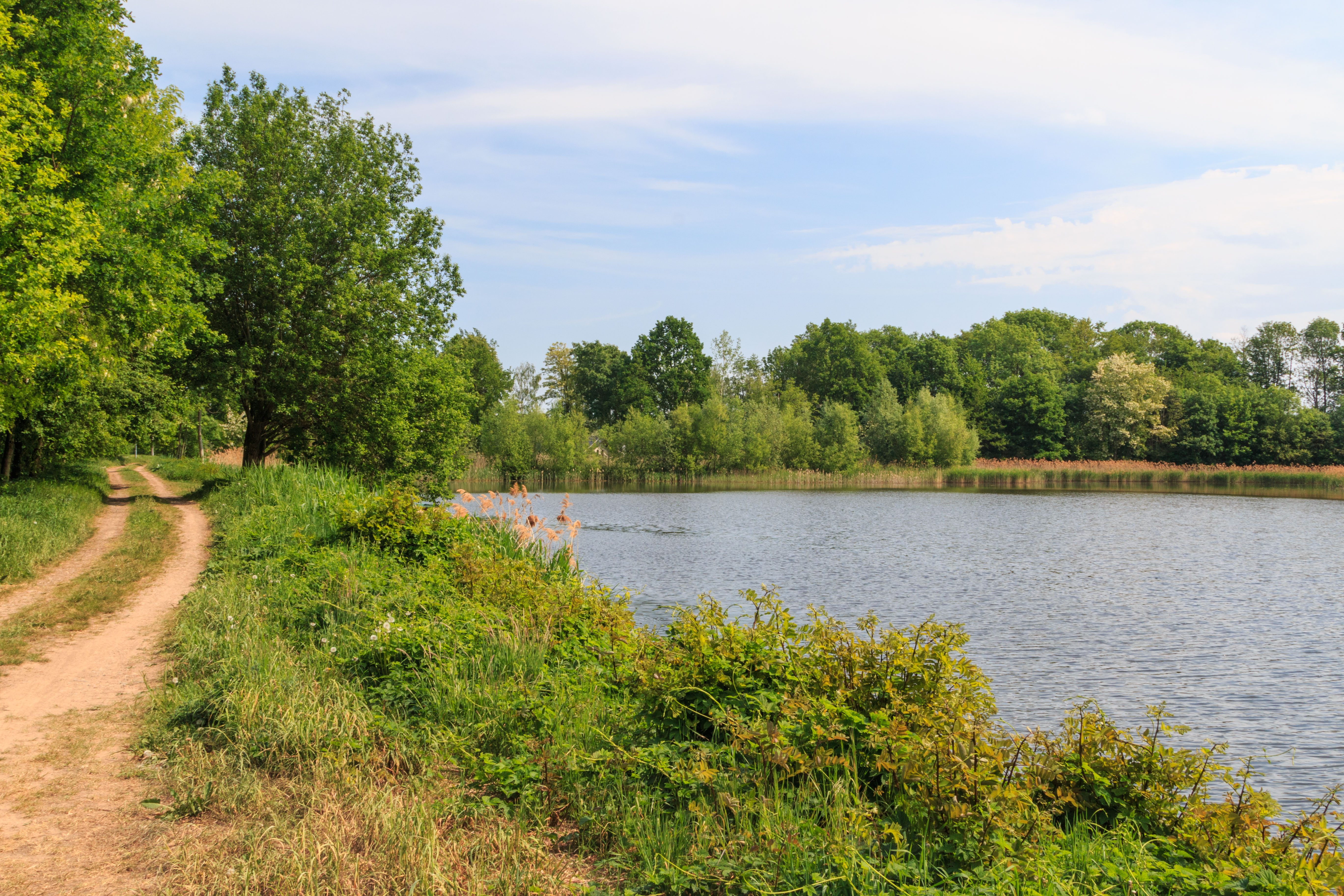 Rybník Ovčín u Zdechovic Mediagrant 2018|Vodstvo